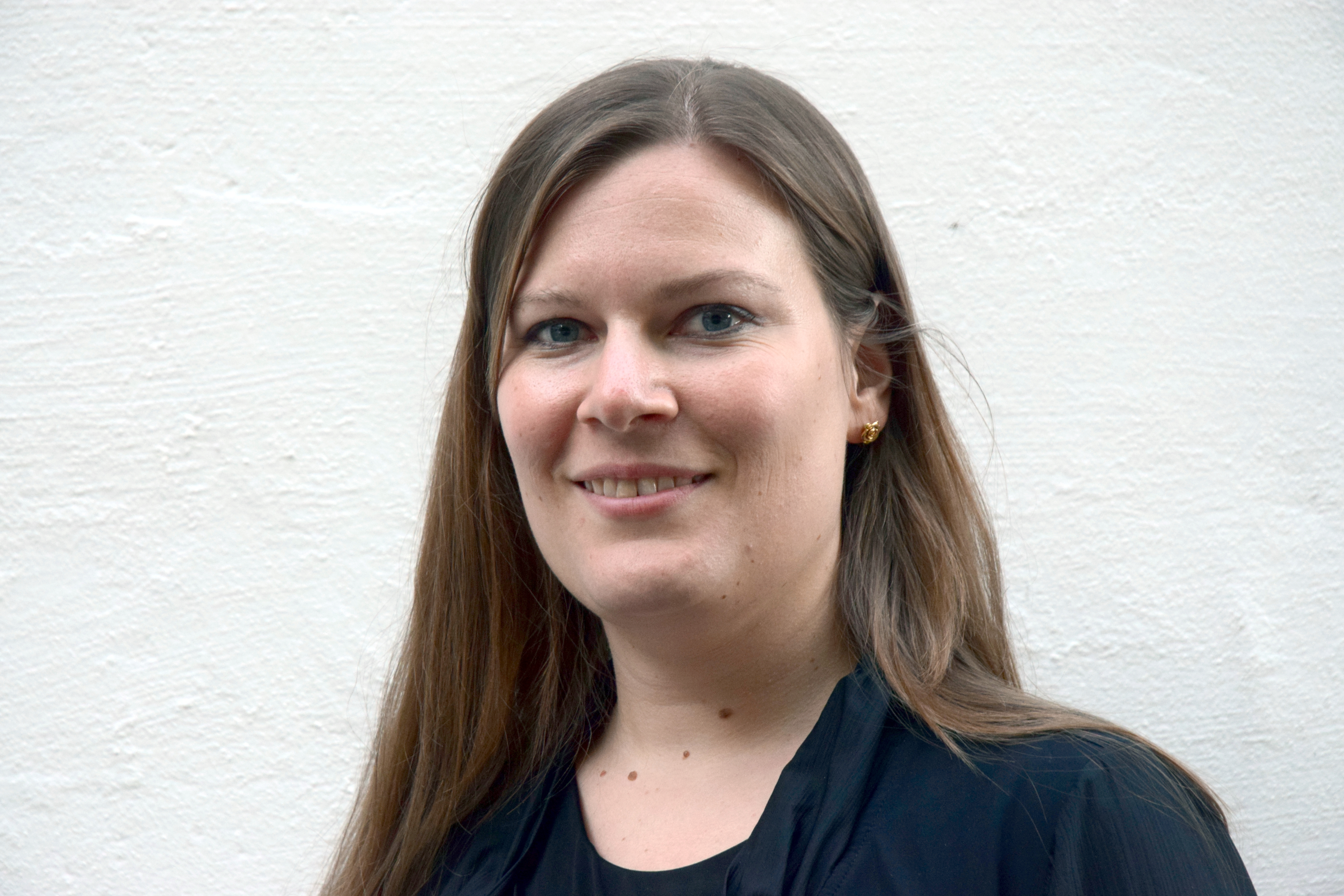 Barbara Marie-Louise Pavelka 2017